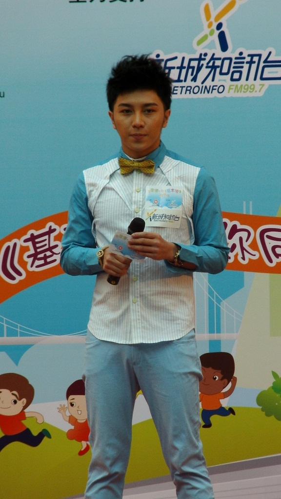 中文（香港）: 鍾一憲的樣子